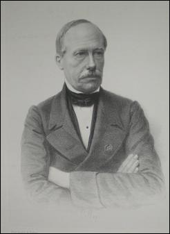 Charles de Brouckère, ministre belge